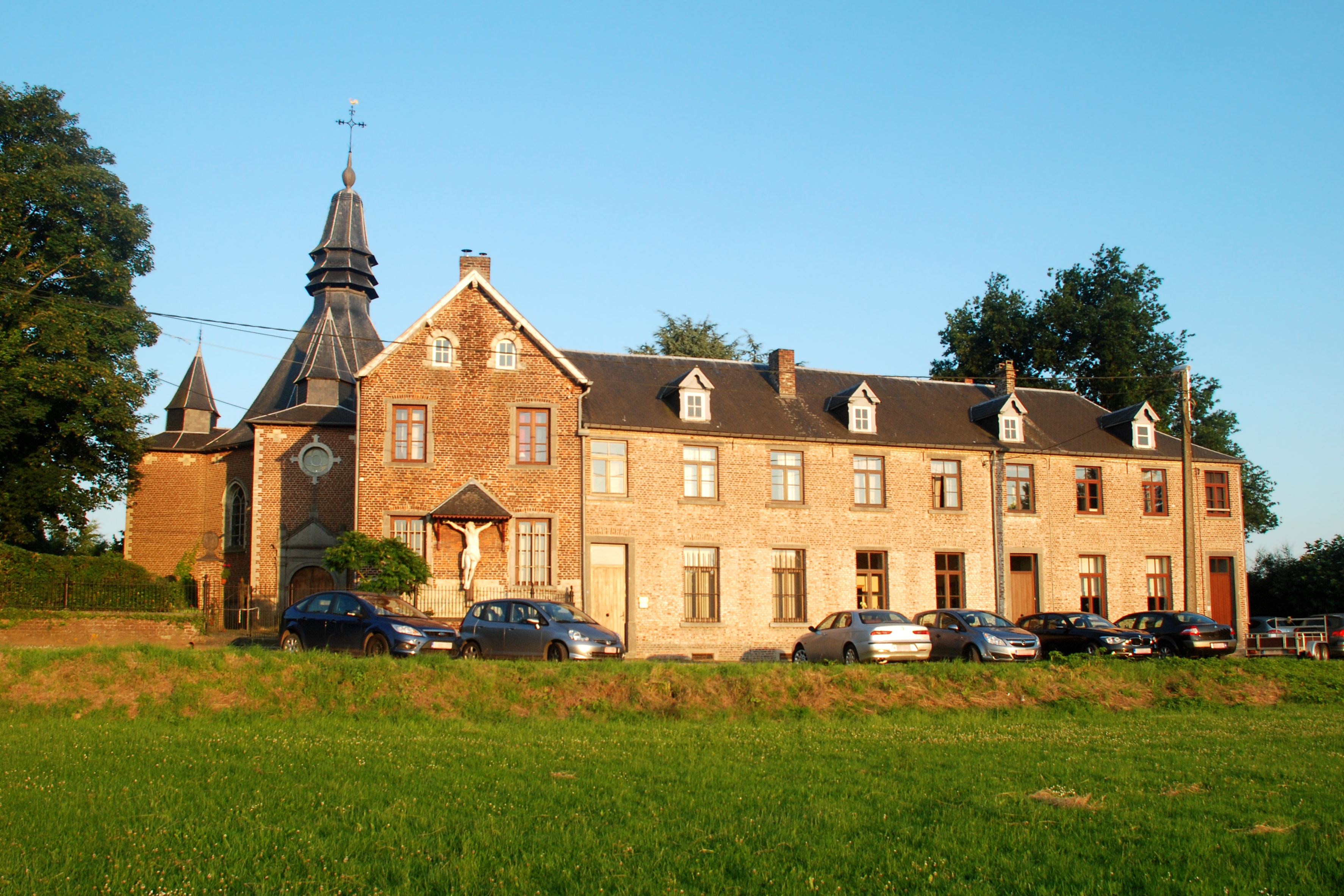 Belgique - Brabant wallon - Genappe - Loupoigne - Chapelle Notre-Dame de Foy